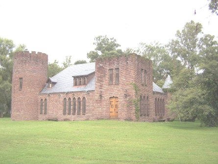 El Embrujo